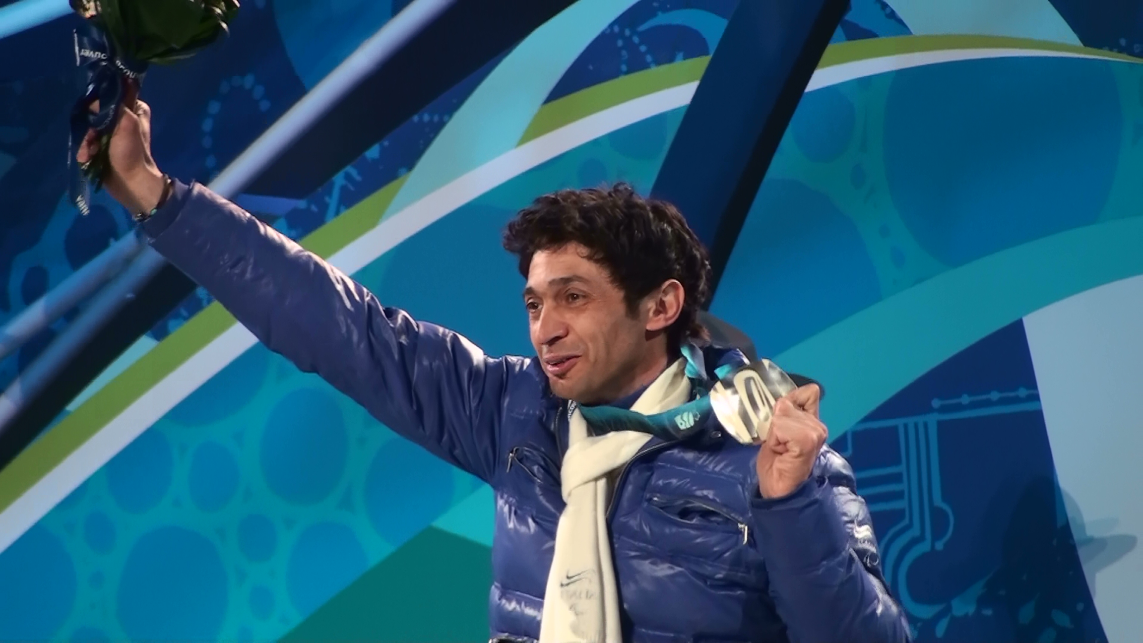 Enzo Masiello, medaglia d'argento ai X Giochi Paralimpici Invernali di Vancouver 2010 nella 10 Km di sci di fondo. Cerimonia di premiazione.